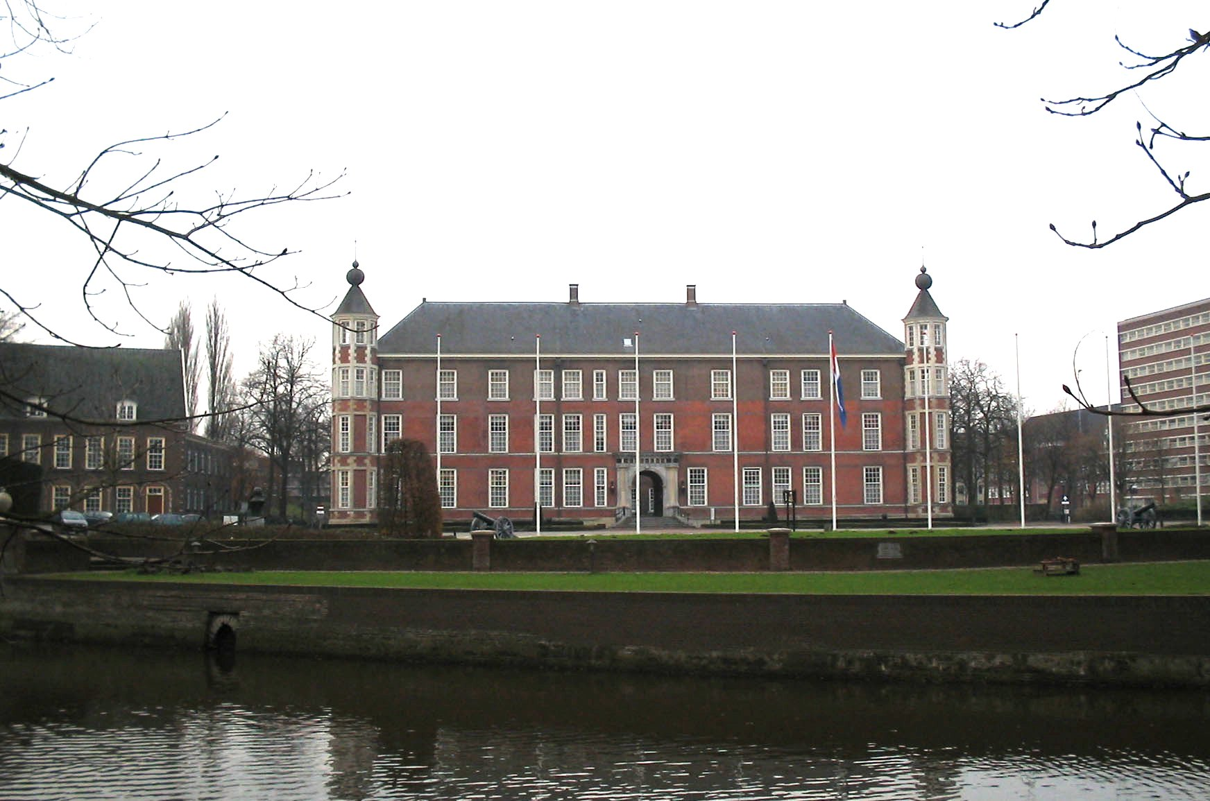 Zicht op een deel van het Kasteel van Breda gezien vanuit het Park Valkenberg. Gevestigd in het centrum van Breda